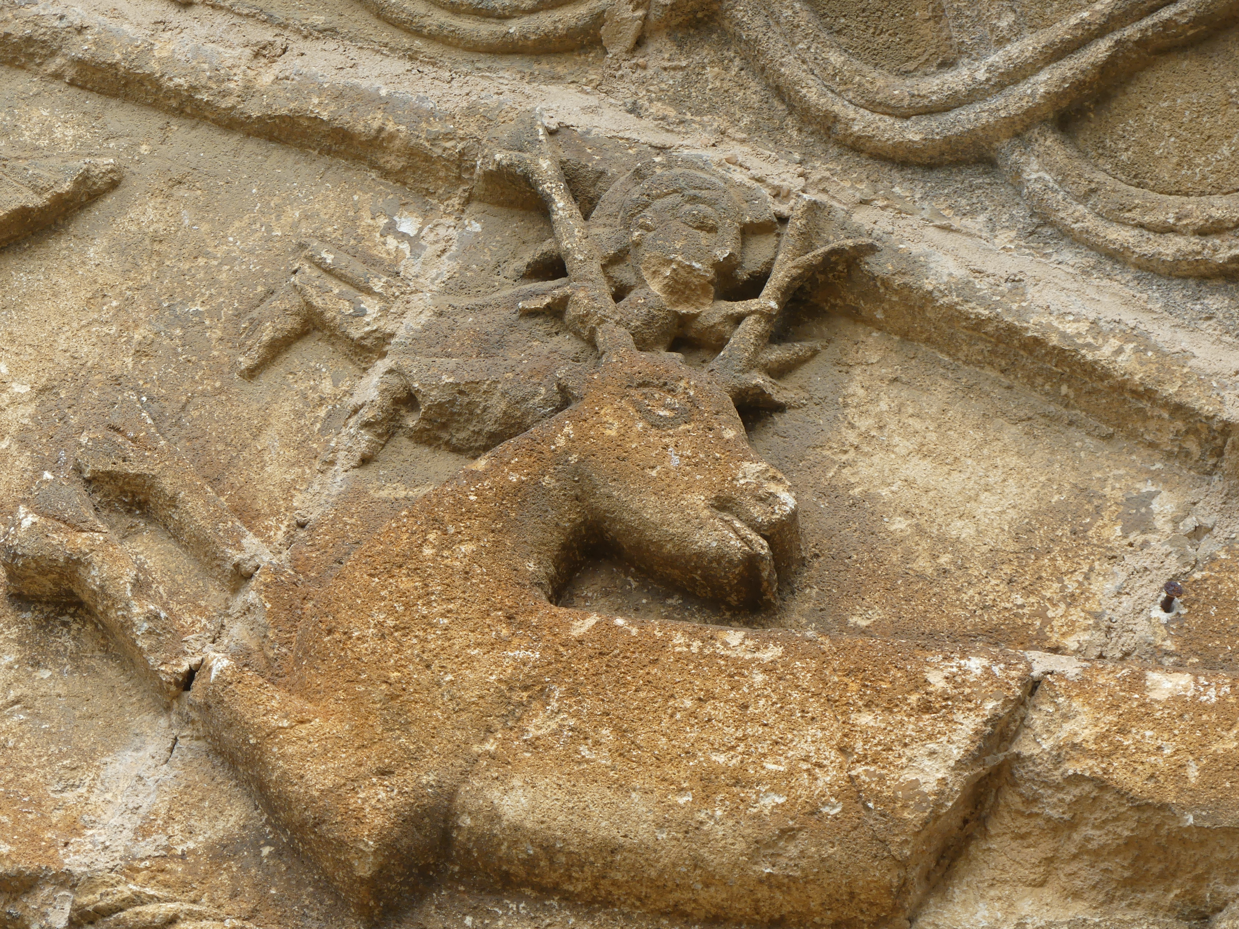 Cerf de Saint Eustache (la croix est remplacée par Jésus), archivolte du portail.